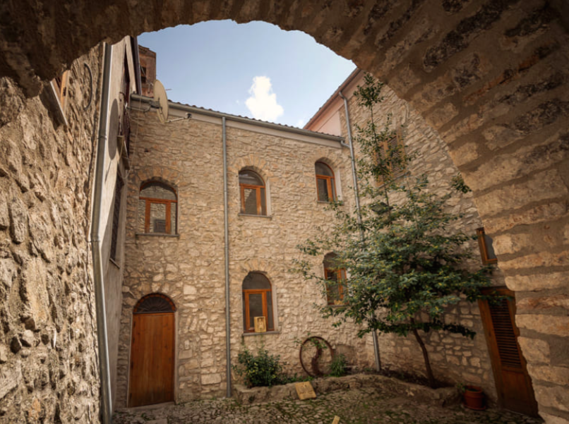 Cortile interno del Museo civico "Nicola Barbato" di Piana degli Albanesi, sito nell'ex Oratorio San Filippo Neri (Rritiri) per i Padri celibi siculo-albanesi di rito greco-bizantino, e già scuola elementare statale e pretura.